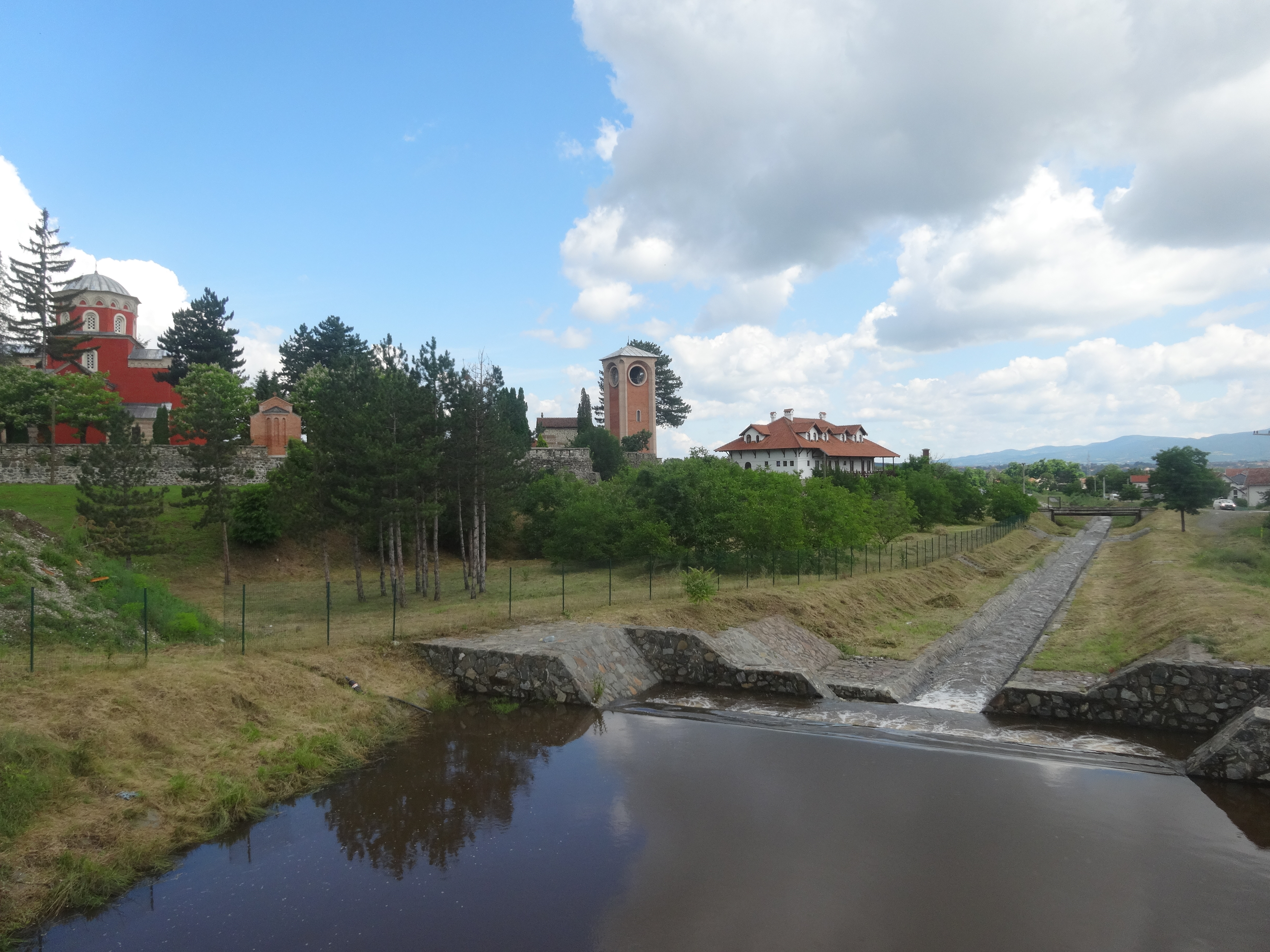 Жича је српски средњовековни манастир из прве половине 13. века, који се налази у близини Краљева. Подигао ју је први краљ Србије, Стефан Немањић.